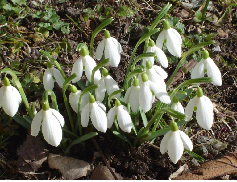 Schneeglöckchen (Galanthus nivalis), Amaryllisgewächse (Amaryllidaceae)